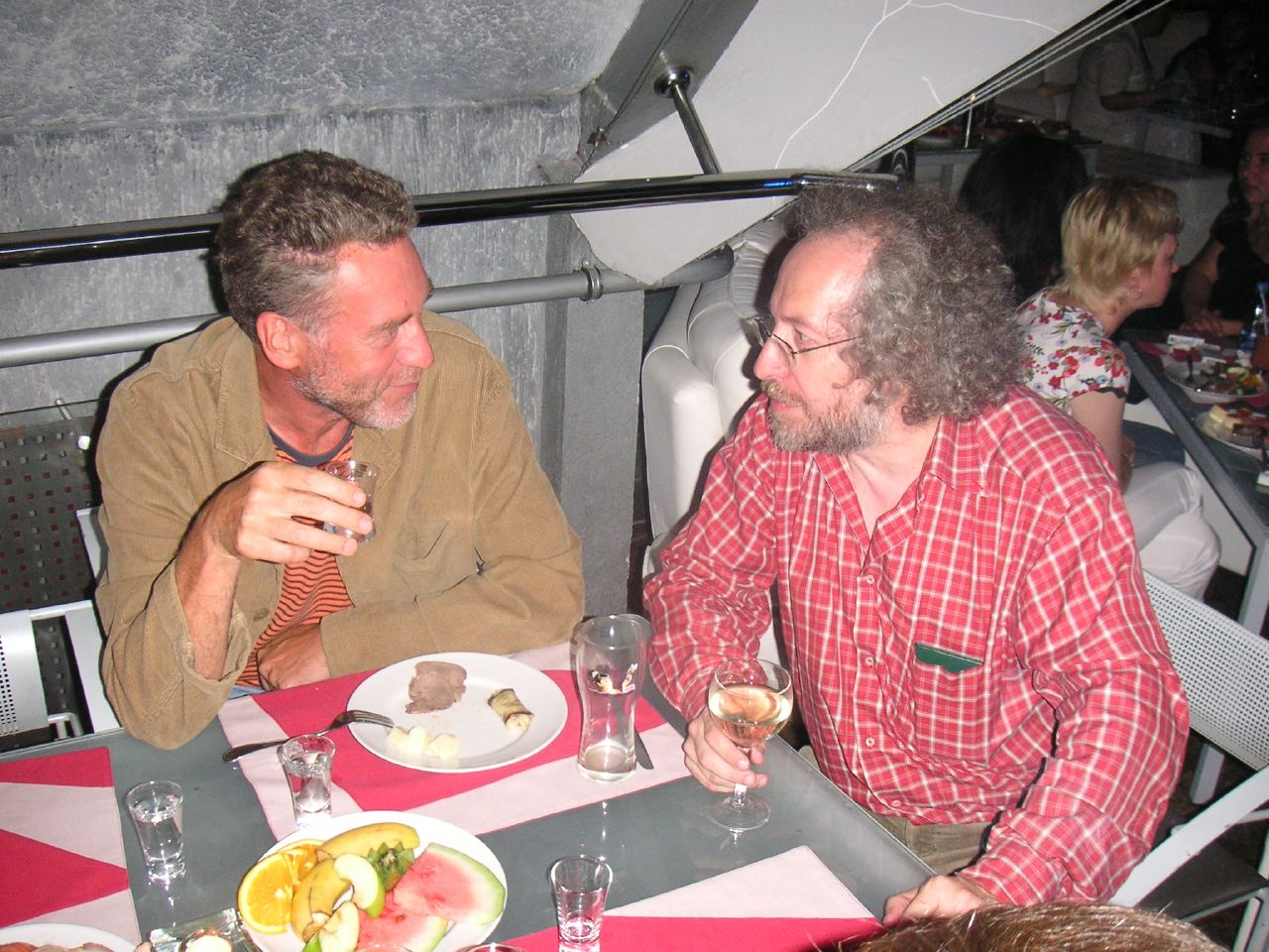 Алексей Венедиктов и Артём Троицкий